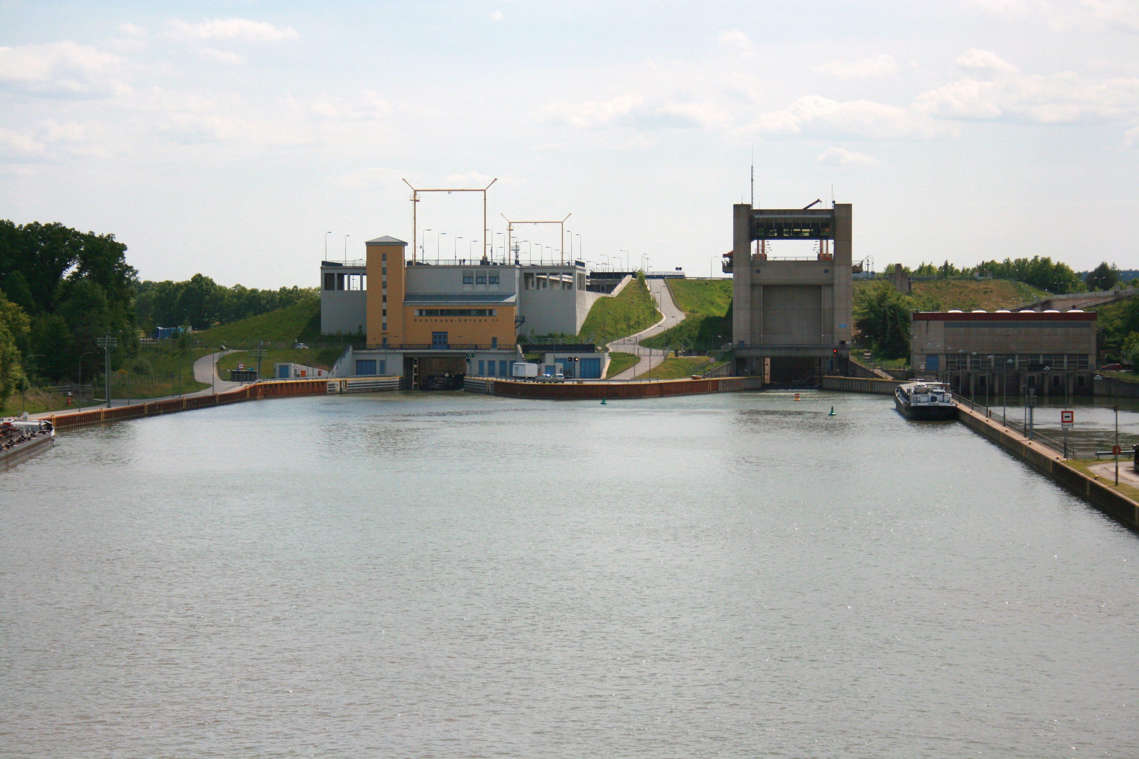 Schleuse Uelzen in Wrestedt, Unterwasser